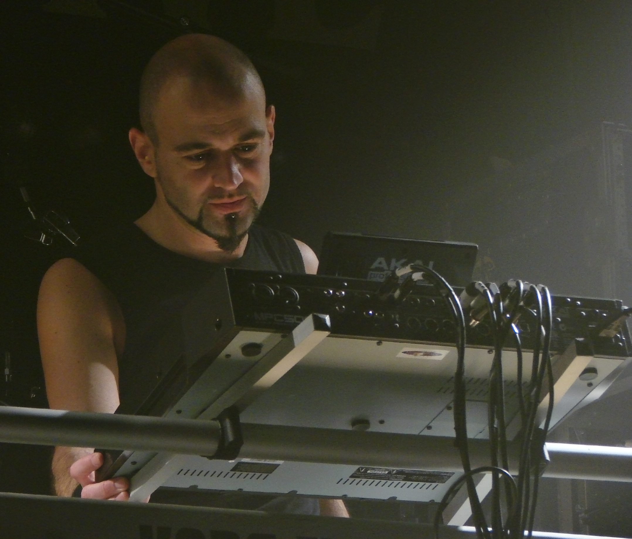 Samael en concert à la Locomotive, à Paris, le 11 Janvier 2009: Xy aux claviers et percussions.